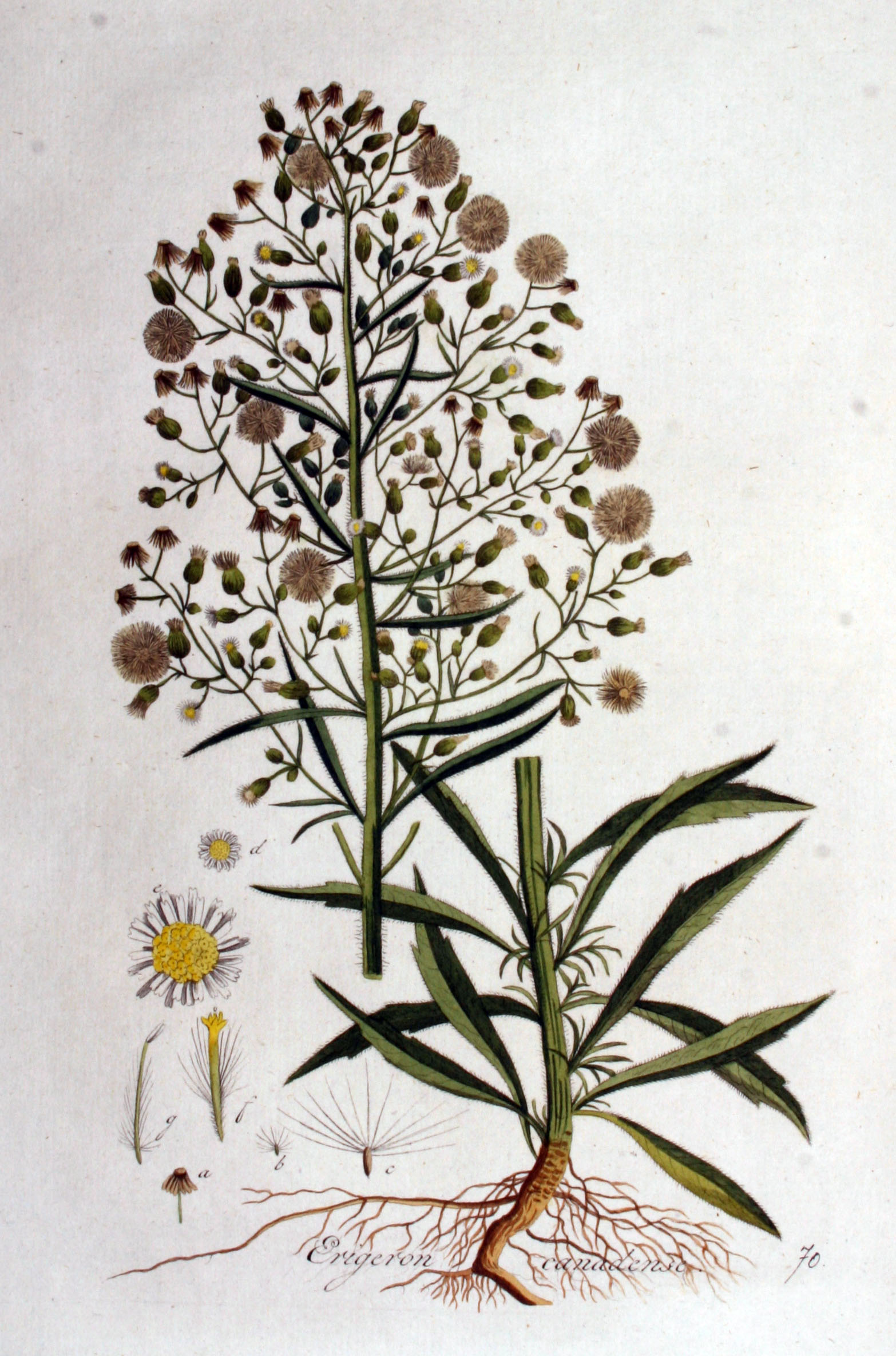 Conyza canadensis (L.) Cronq. (Syn. Erigeron canadensis L.)